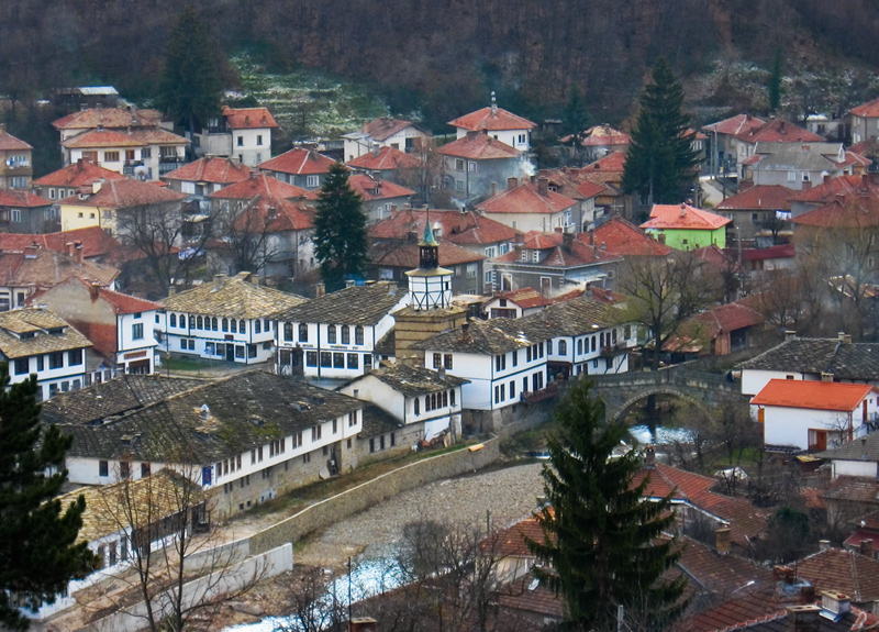 Изглед-гр.Трявна